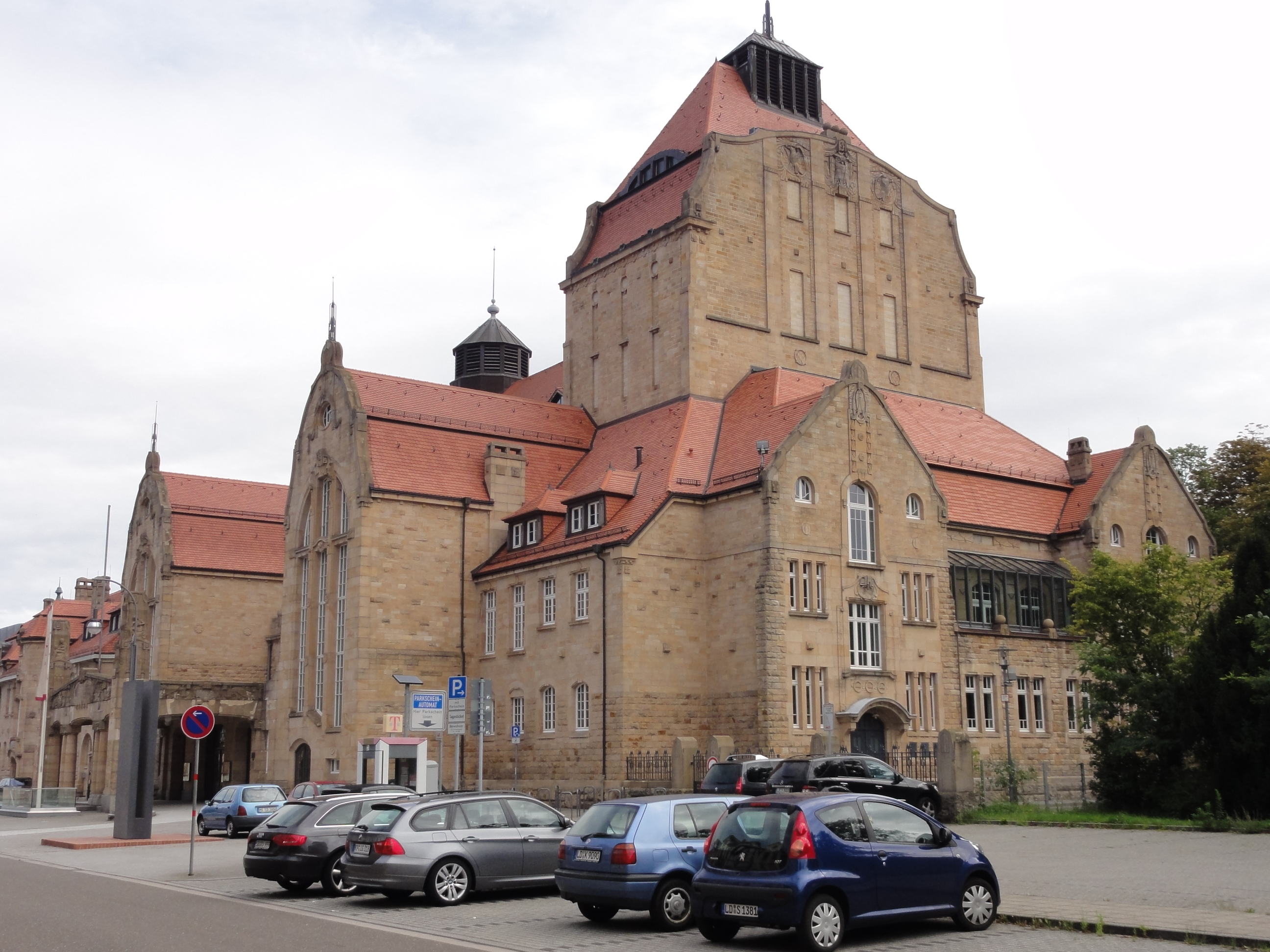 Rheinland-Pfalz, Landau in der Pfalz, Festhalle